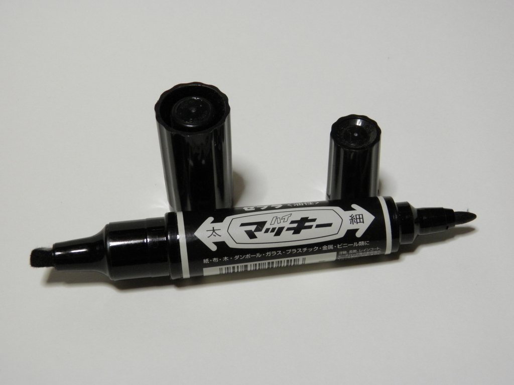 ゼブラ ハイマッキー